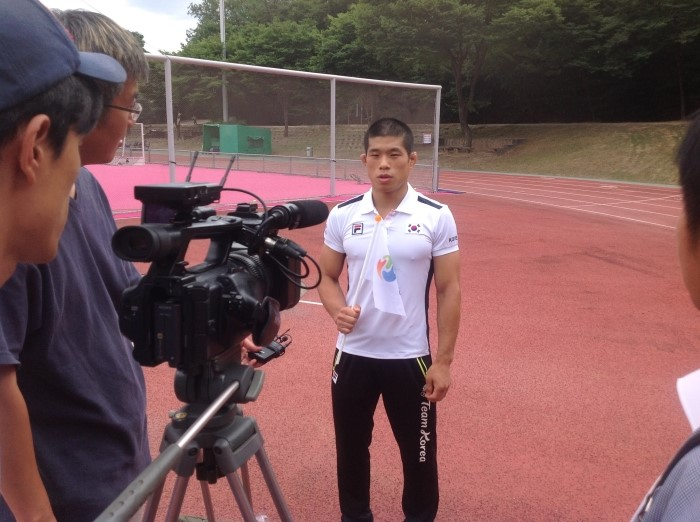 레슬링 선수 정지헌